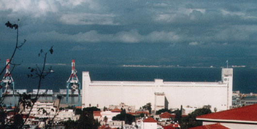 Dagonsilo in Haifa (Israel).